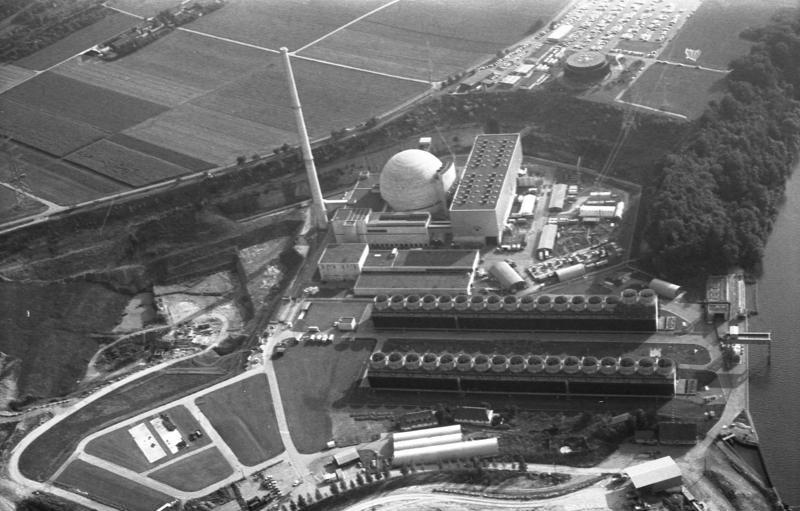 Rhein-Bodensee-Bereisung des Rates von Sachverständigen für Umweltfragen und des Bundesministeriums des Inneren.